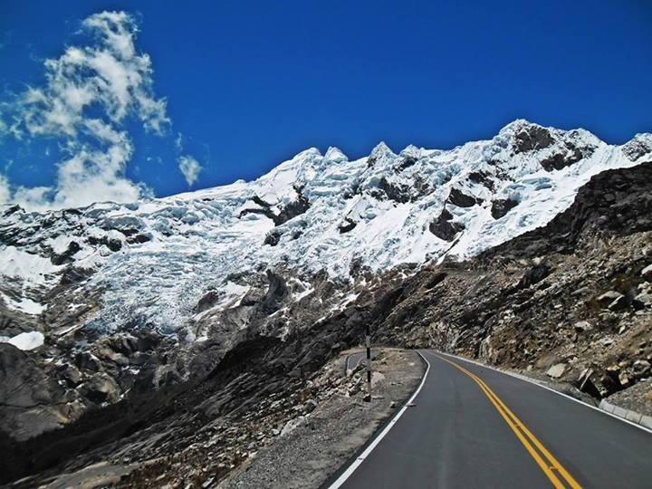 Ruta AN-107 a 4500 msnm. Al fondo, el nevado Contrahierbas.